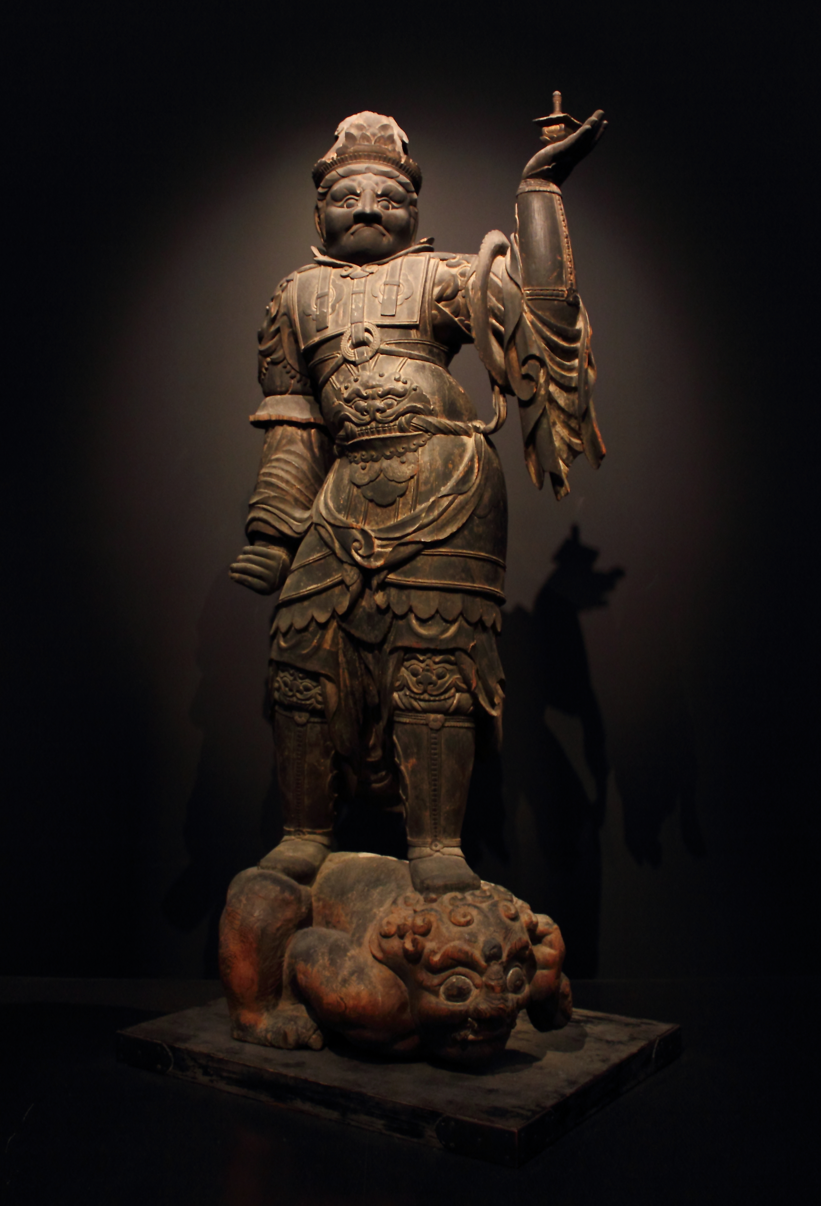 平安時代の毘沙門天立像（重要文化財）。和歌山県・道成寺所蔵、東京国立博物館にて展示。